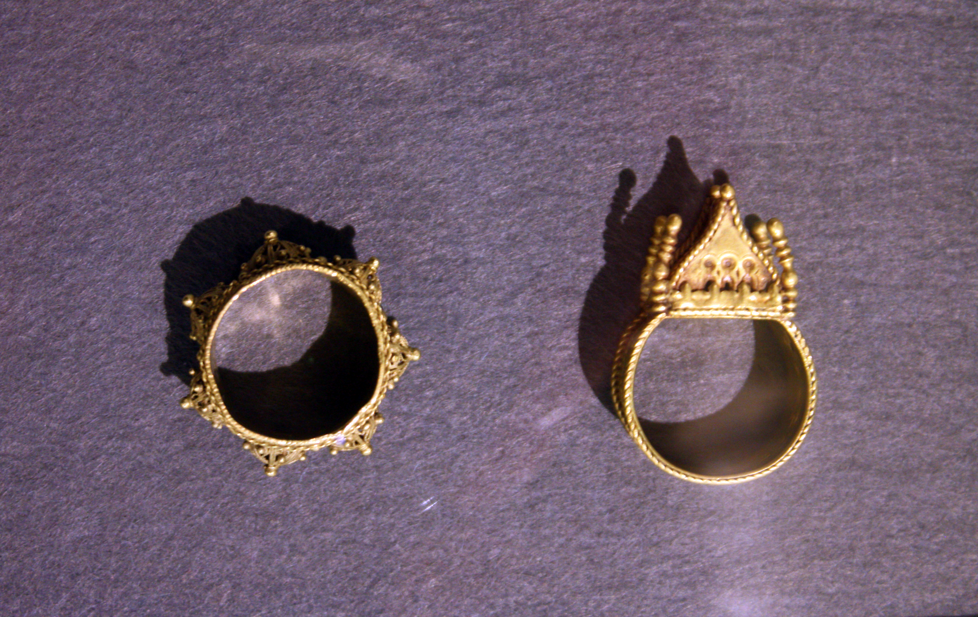 Goldschmiedearbeit traditioneller jüdischer Hochzeitsringe. Der Ring des Mannes zeigt symbolhaft das Dach einer Synagoge, des Tempels oder die Gründung des eigenen Hauses. Die Ringe wurden nur zur Hochzeit getragen, bei der der Bräutigam seiner Braut den Ring an den Finger steckte und sprach: „ Du bist mir verbunden nach dem Gesetze Moses und Isaaks“.